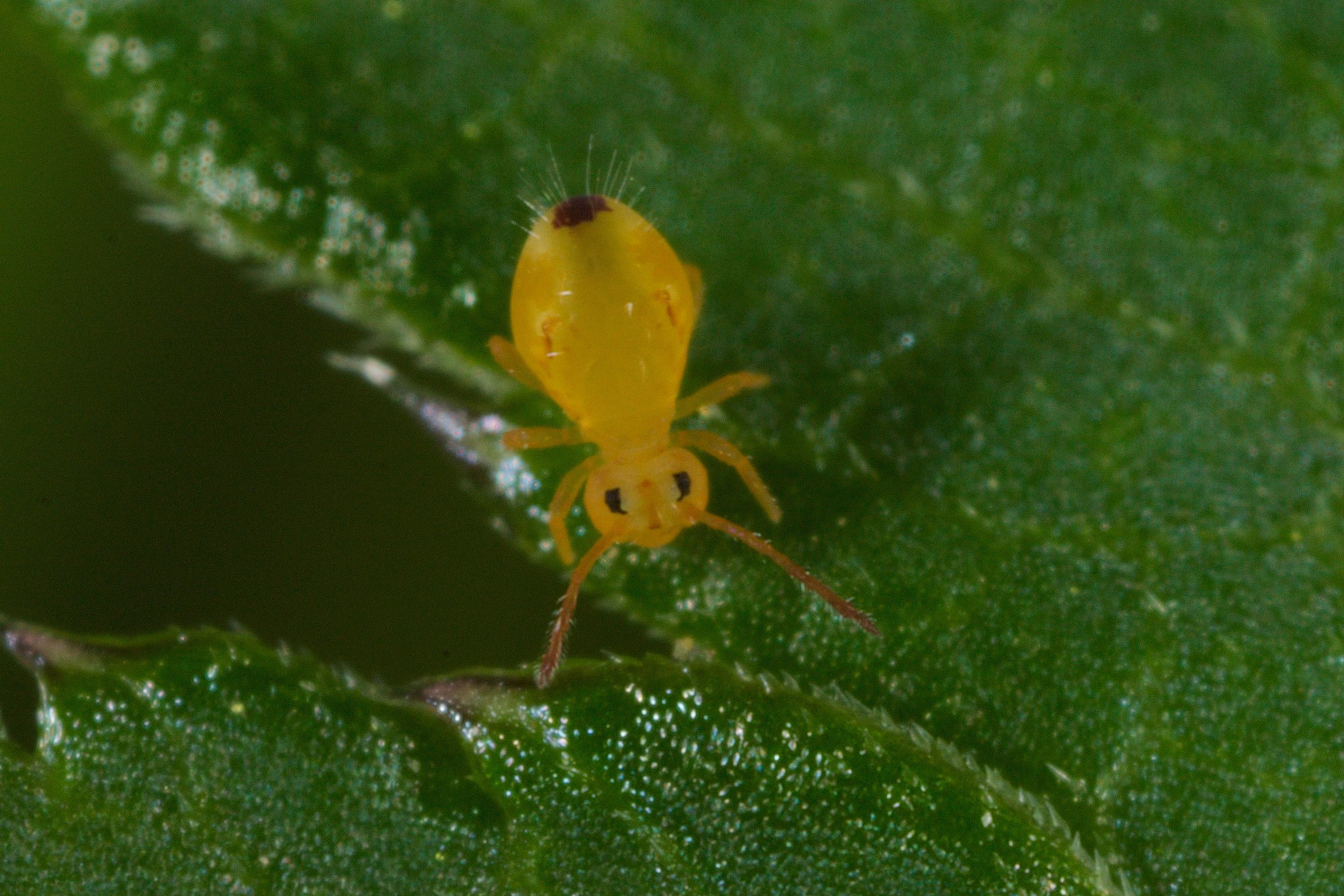 Dicyrtomina minuta